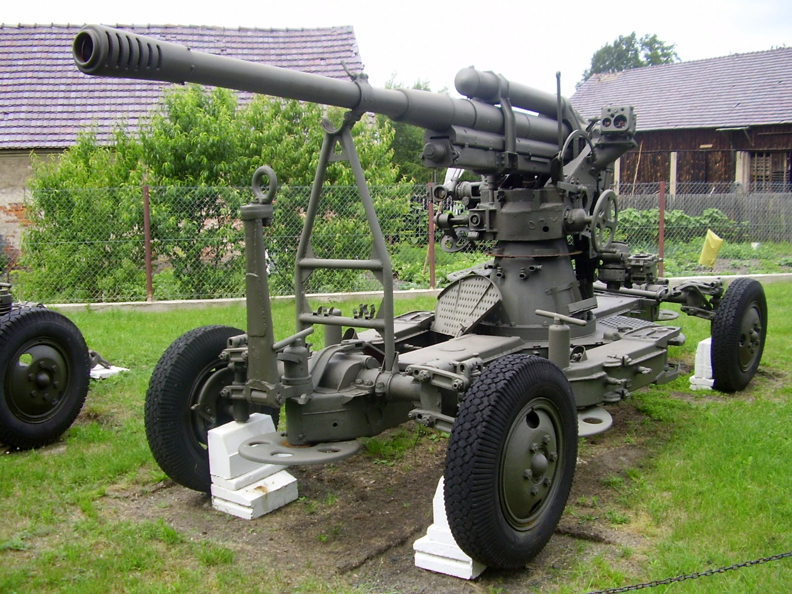 85 mm armata przeciwlotnicza wz. 1939 (52-K)